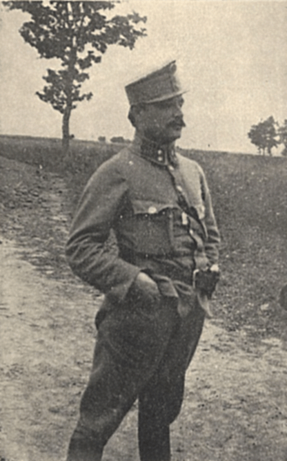 Porucznik Jan Łysek 1914.